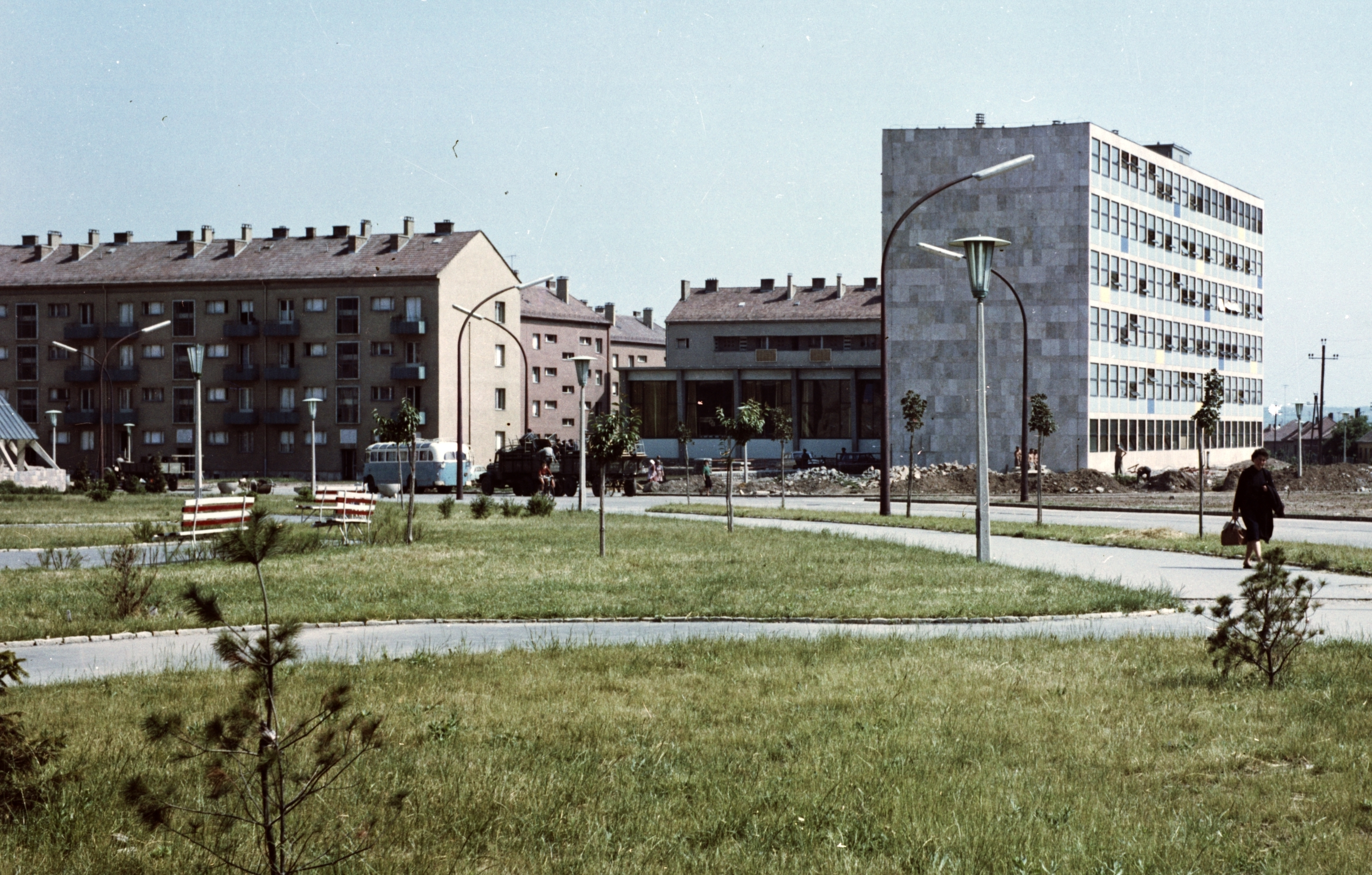 Esztergár Lajos utca, szemben a Mecseki Ércbányászati Vállalat irodaháza. Location: Hungary, Uránváros Tags: colorful, bus Title: Esztergár Lajos utca, szemben a Mecseki Ércbányászati Vállalat irodaháza.